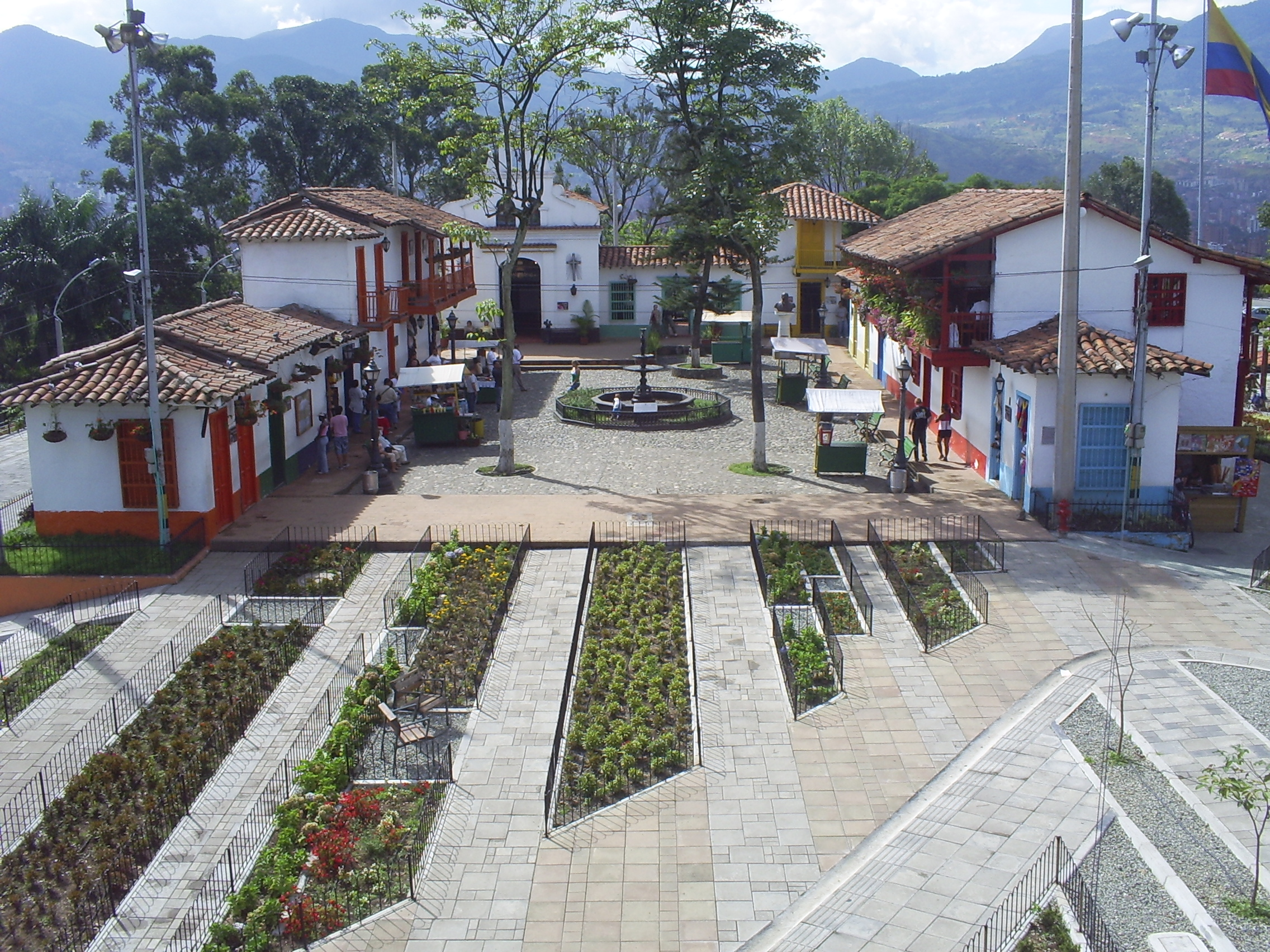 Pueblito Paisa, Medellín, Colombia.